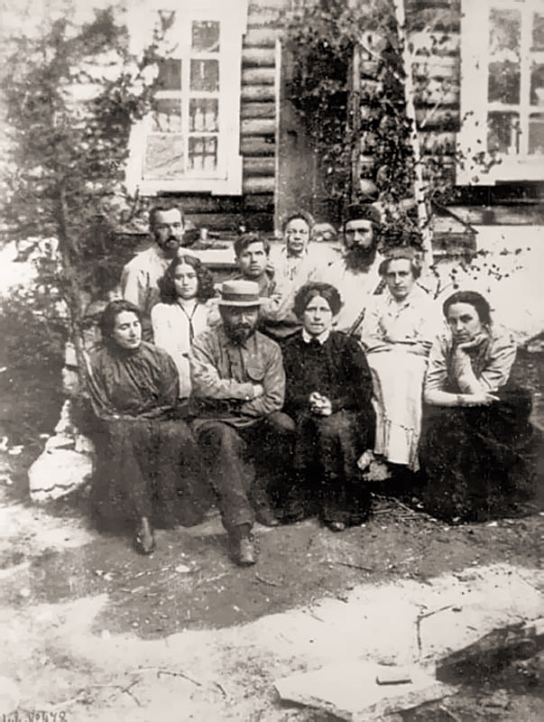 Foto di gruppo con Egor Sozonov nella prigione di Akatuj, nell'estate del 1906. In prima fila: Marija Markovna Škol'nik, Grigorij Andreevič Geršuni, Marija Aleksandrovna Spiridonova, Alexandra Adolfovna Izmailovič, Anastasija Alekseevna Bicenko; in seconda fila: Egor Sergeevič Sozonov, Revekka Moiseevna Fialka, Pëtr Sidorčuk, Lidija Pavlovna Ezerskaja, e Pëtr Vladimirovič Karpovič